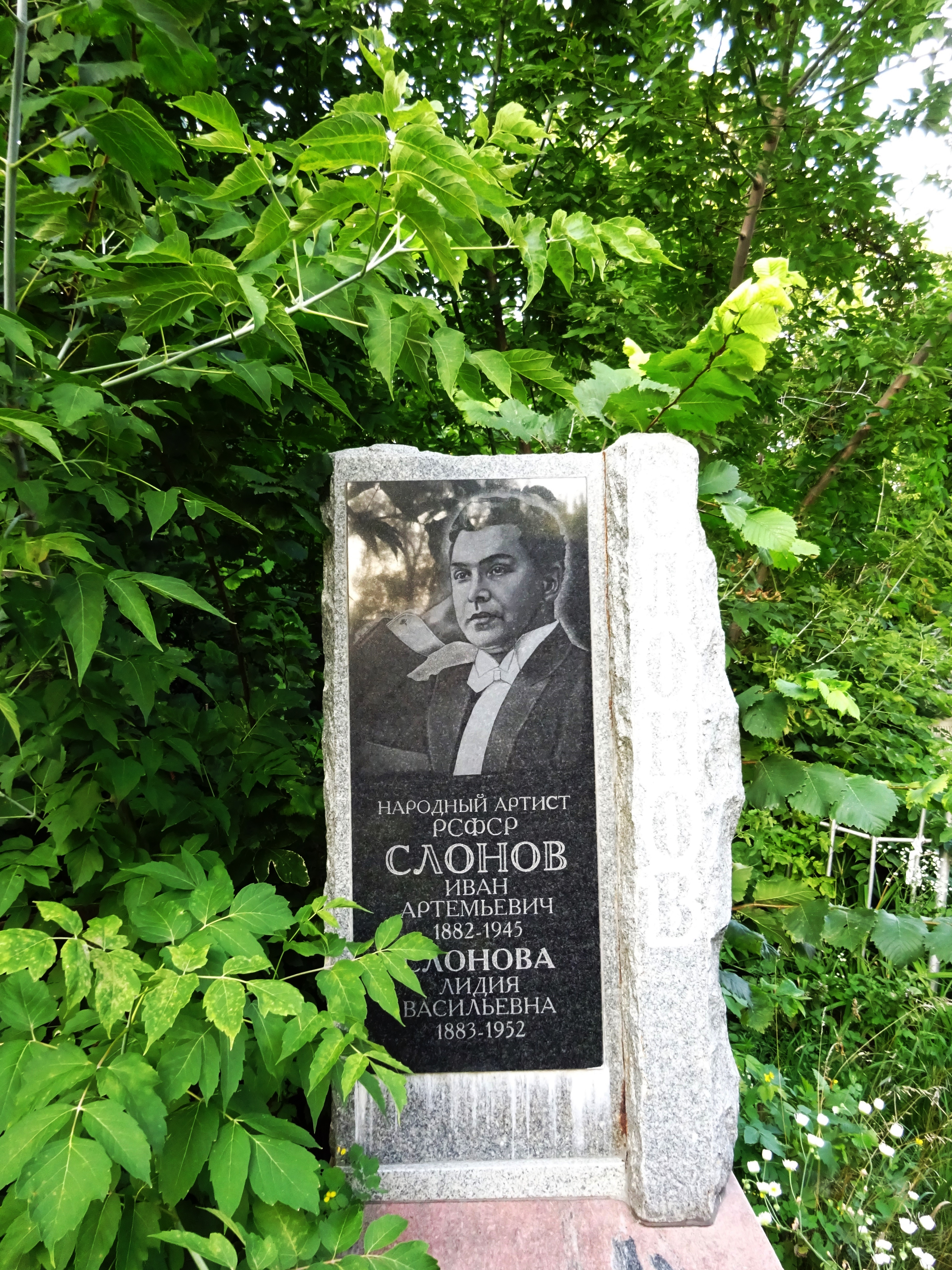 Могила Слонова Ивана Артемьевича (1882-1945), народного артиста РСФСР: Воскресенское кладбище (1 участок), Саратов, Саратовская область.